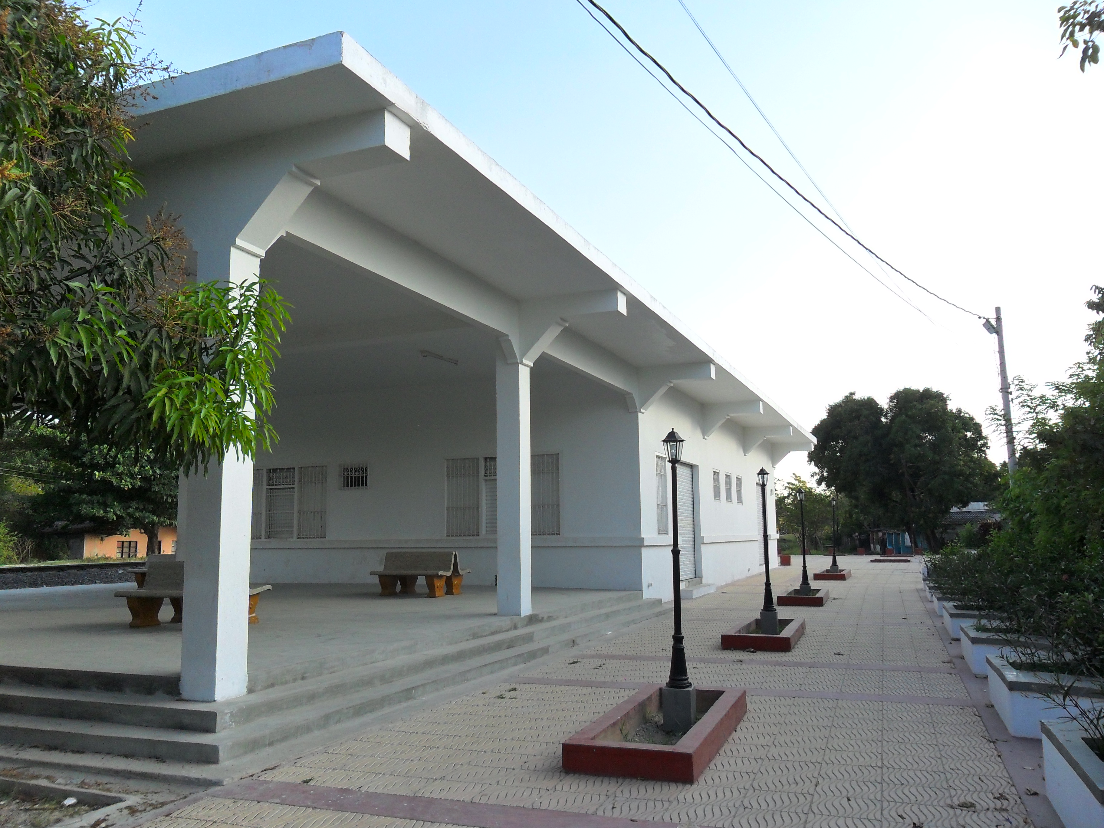 The train station, where Gabo returned to in the 1950's when he saw the next level of Macondo and cien años de soledad.